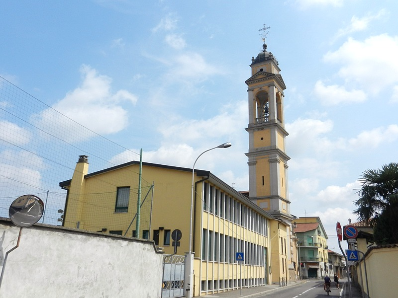 Gessate - Oratorio S. Giovanni Bosco